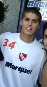 Patricio Julián Rodríguez en una calle peatonal de Mar del Plata.